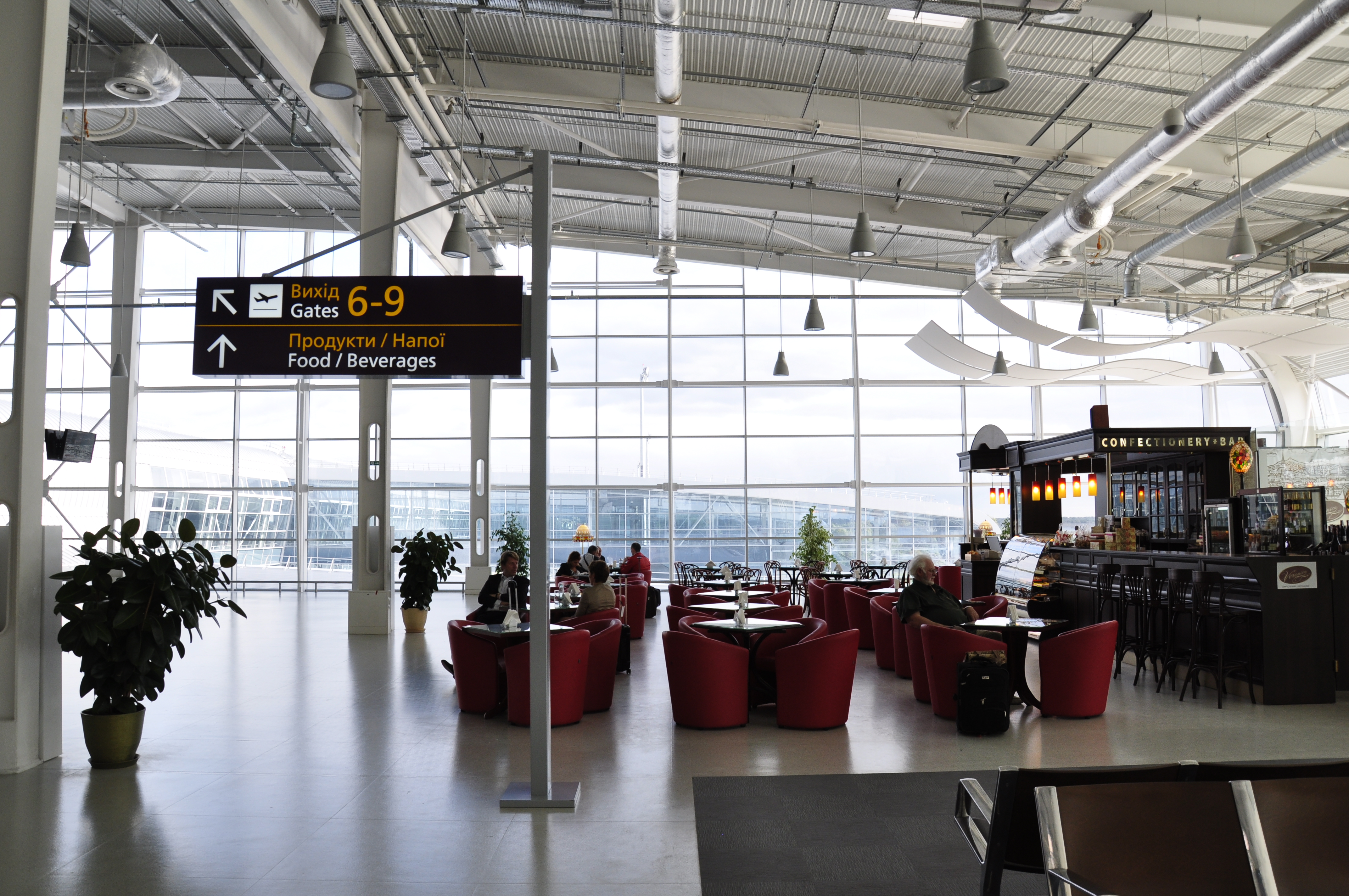 Виходи у Львові